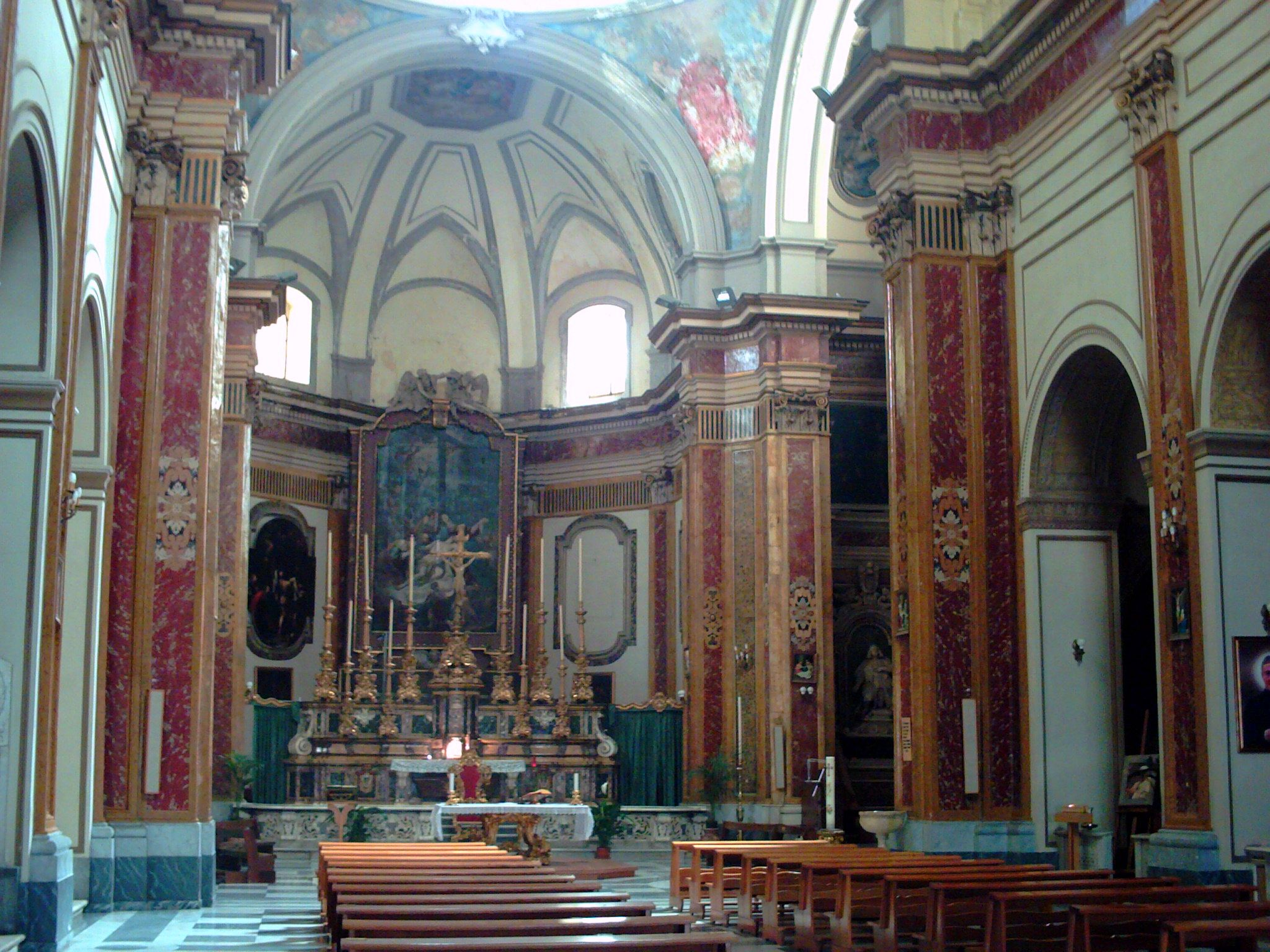 L'interno, Chiesa della Pietà dei Turchini (Napoli)